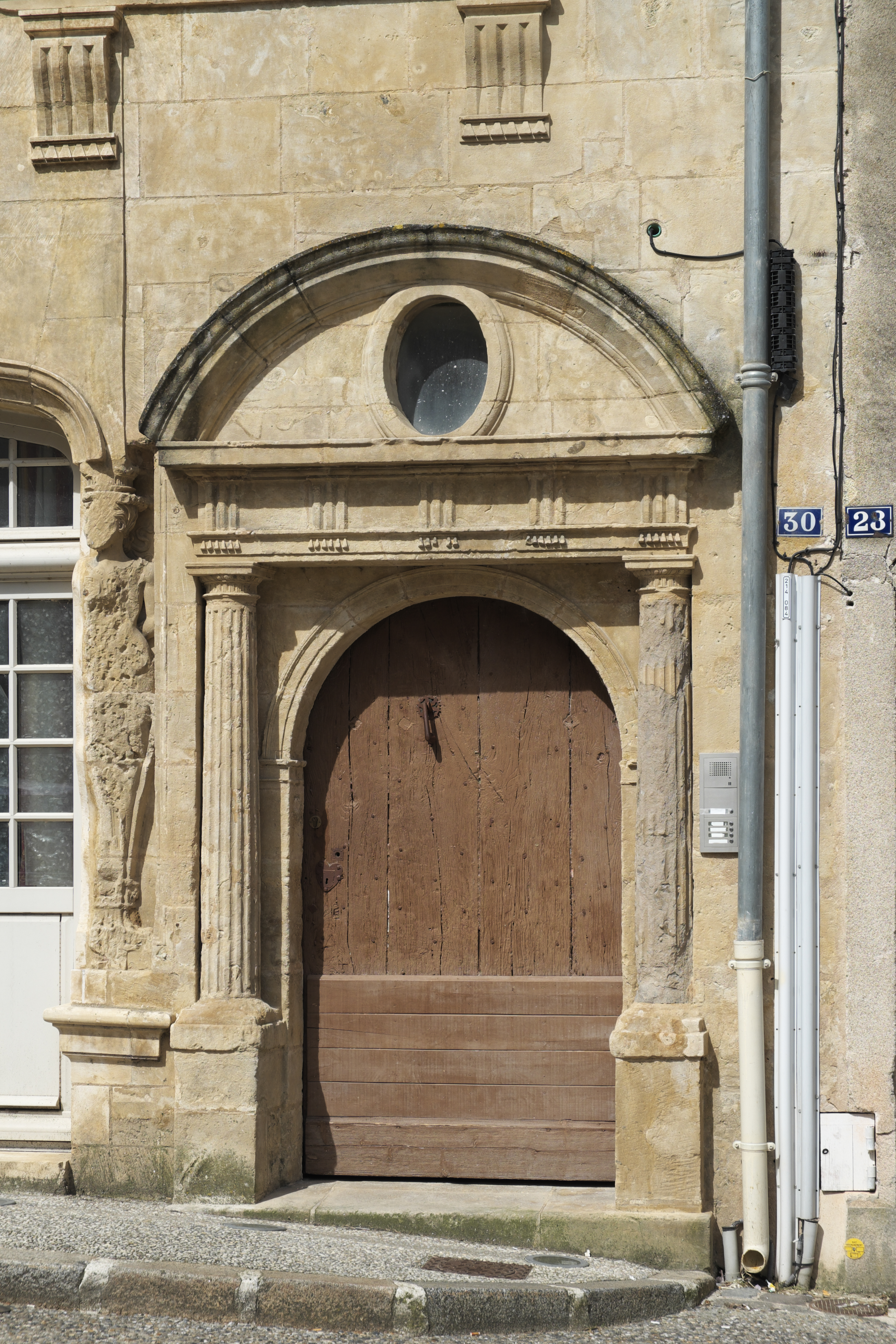 Hôtel de la Pérate (Maison de François Viète), 30 rue Gaston-Guillemet, in Fontenay-le-Comte im Département Vendée (Pays de la Loire/Frankreich), Portal